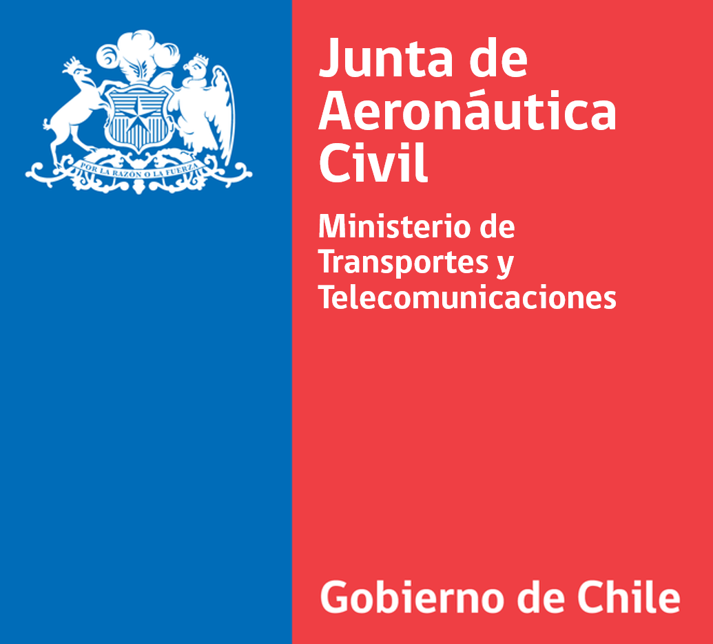 Logo institucional de la Junta de Aeronáutica Civil.